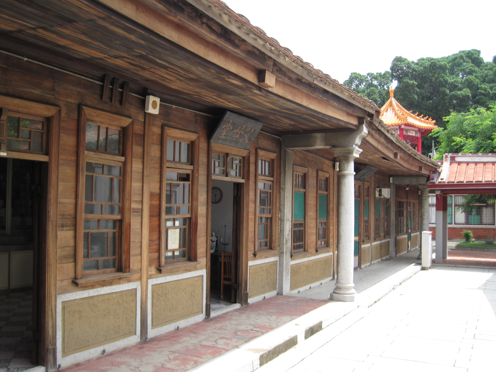 臺南開元寺左護龍